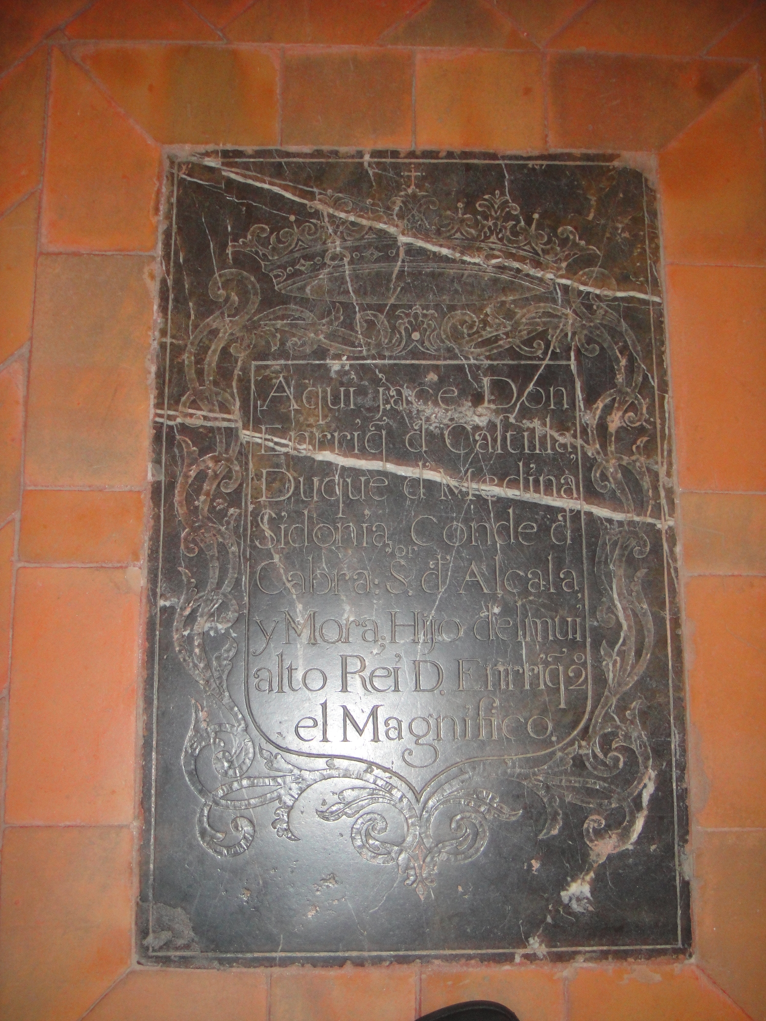 Tumba de Enrique de Castilla (1378-1404), que fue duque de Medina Sidonia y conde de Cabra y era hijo ilegítimo del rey Enrique II de Castilla y de Juana de Sousa. La tumba se encuentra junto al lado de la Epístola de la capilla mayor de la Mezquita-catedral de Córdoba, aunque en la parte exterior de dicha capilla.